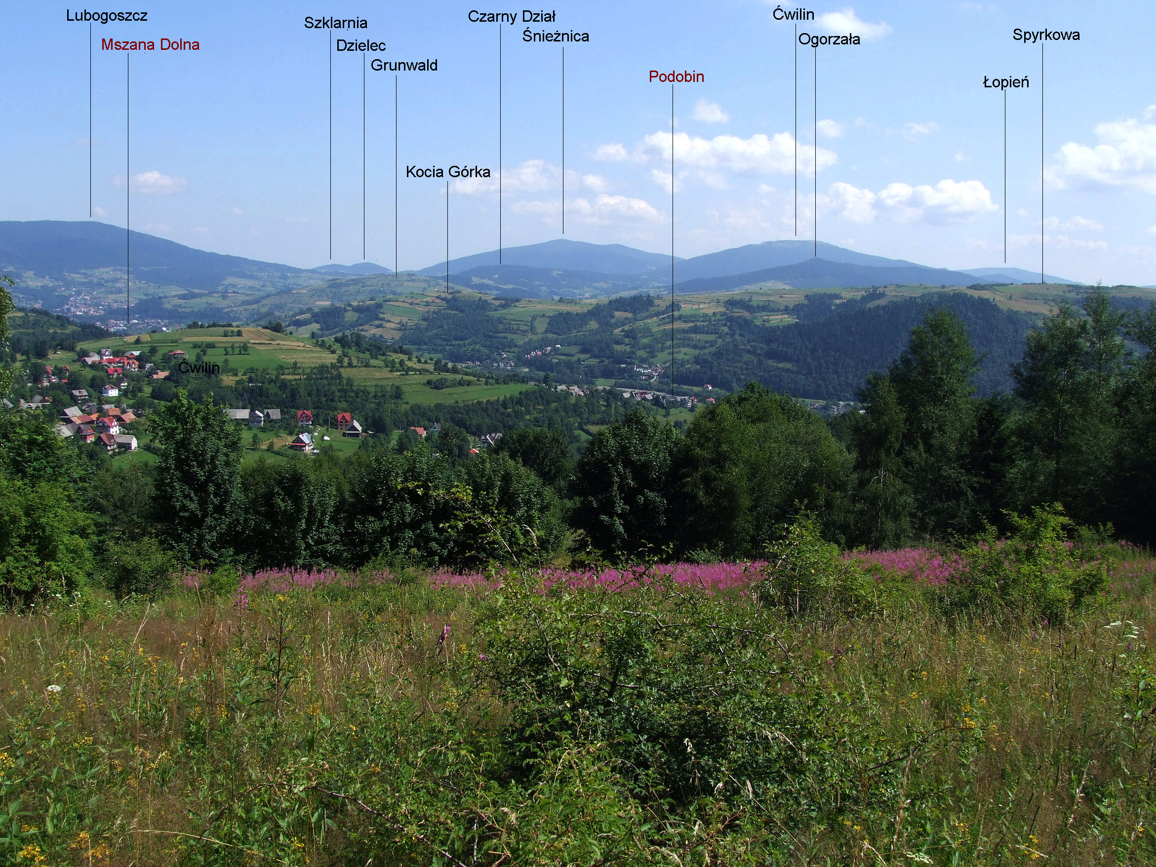 Widok z Potaczkowej